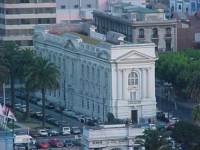 Fotografía de la Biblioteca Santiago Severin